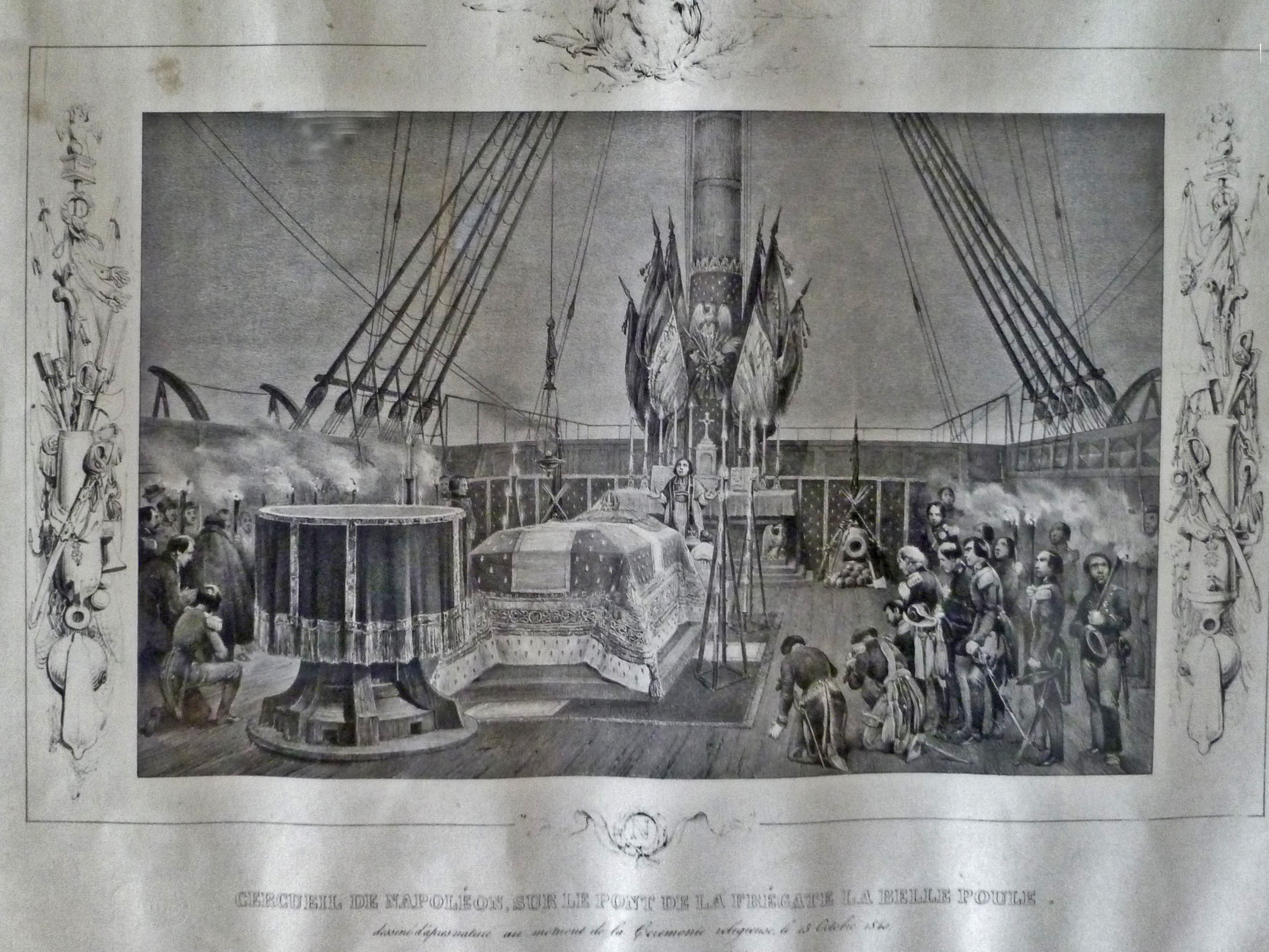 Retour des cendres de Napoléon I; cérémonie réligieuse sur la fregatte La Belle Poule; auteur : anonyme; exhibition au château de La Baume, France